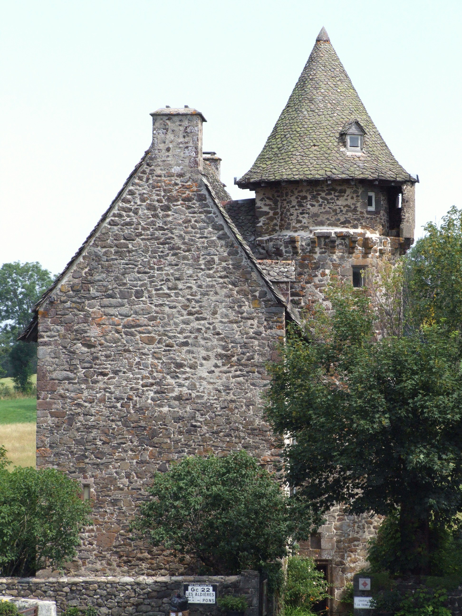 Anglards-de-Salers - Château de La Trémollière